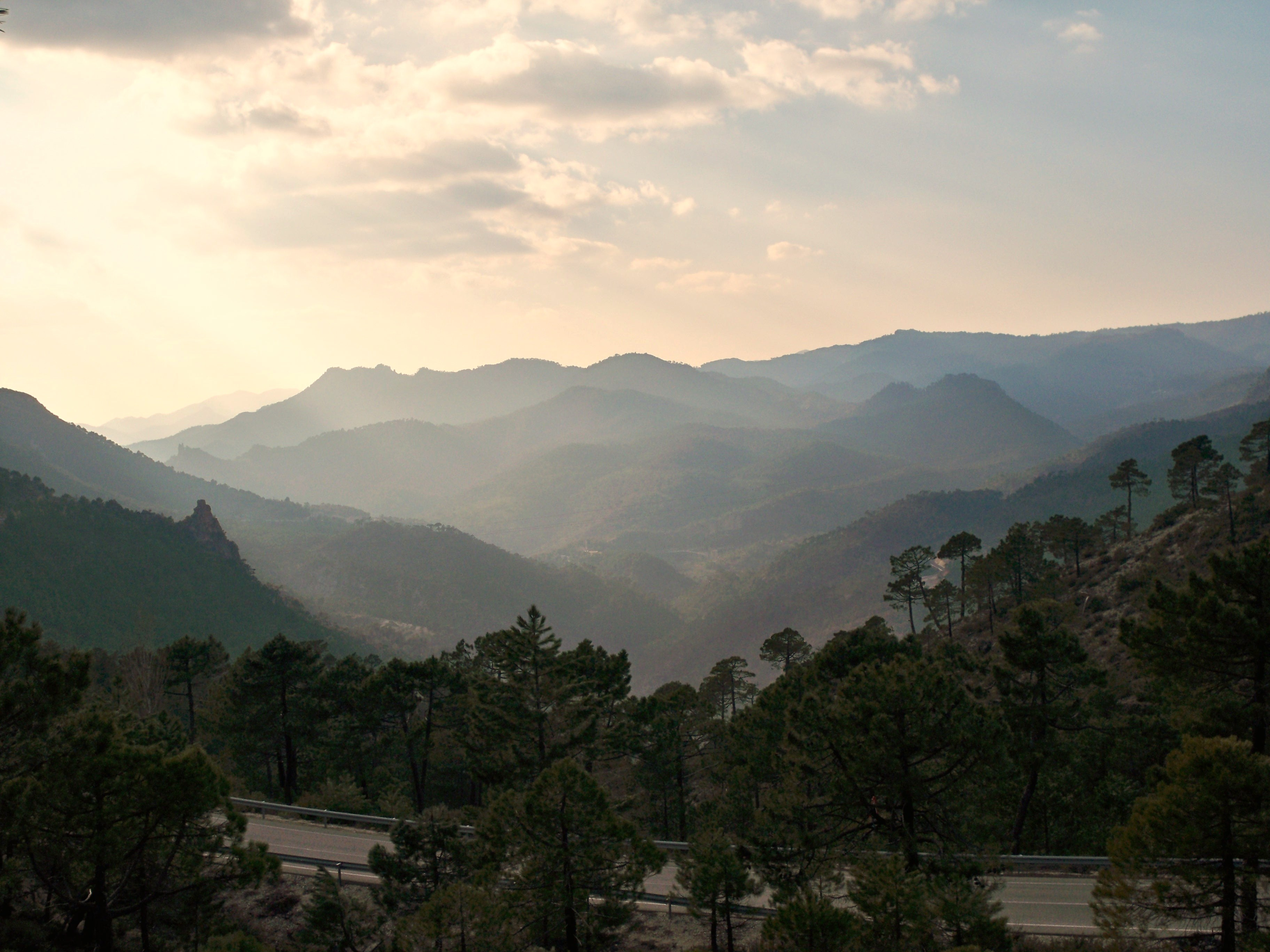 Vistas del valle del río Mundo, al inicio del Parque Natural de los Calares del río Mundo y de la Sima en el término municipal de Molinicos (Albacete), cerca de la localidad de El Pardal